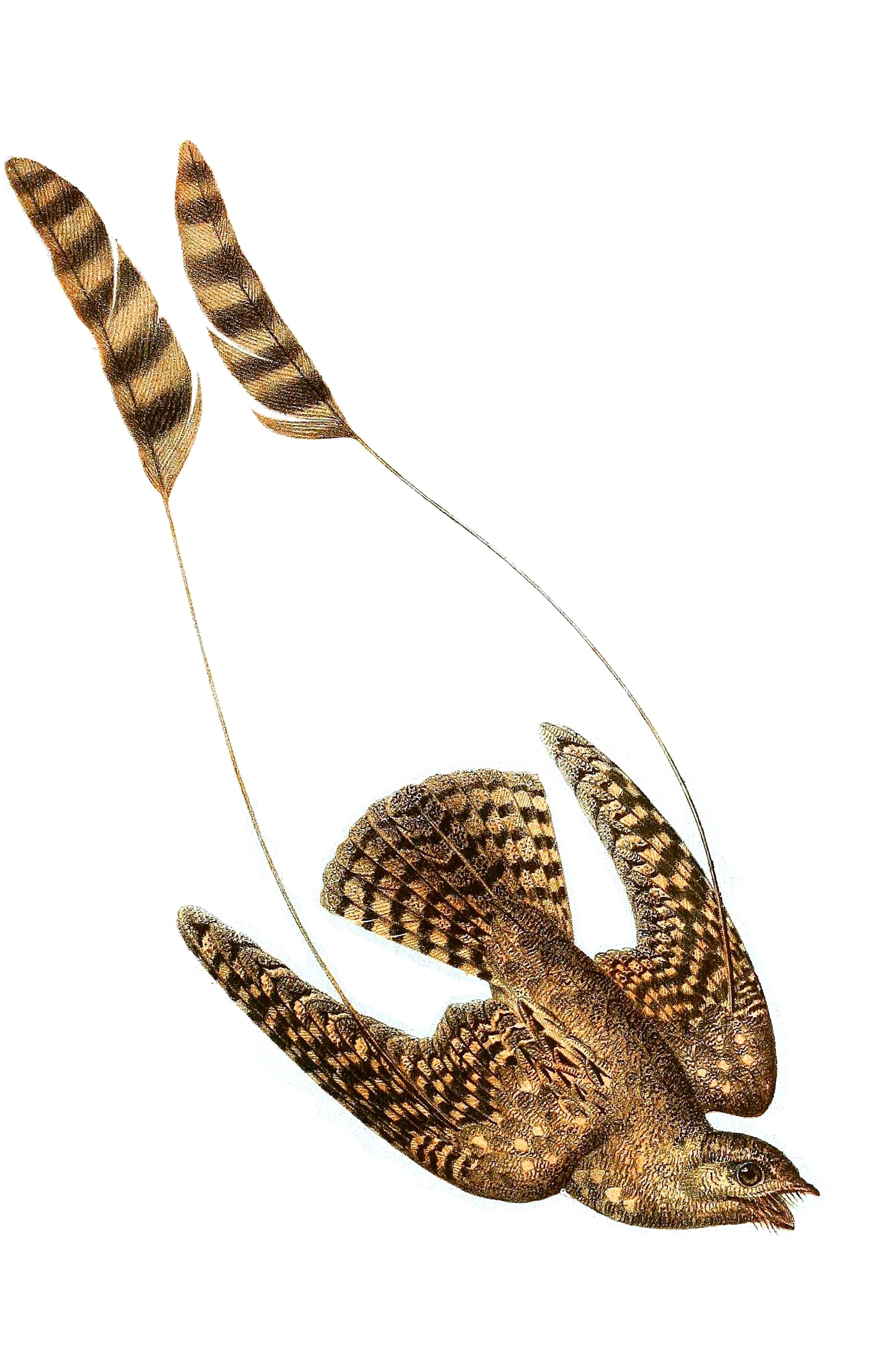 Вымпеловый козодой Macrodipteryx longipennis (Shaw, 1796)